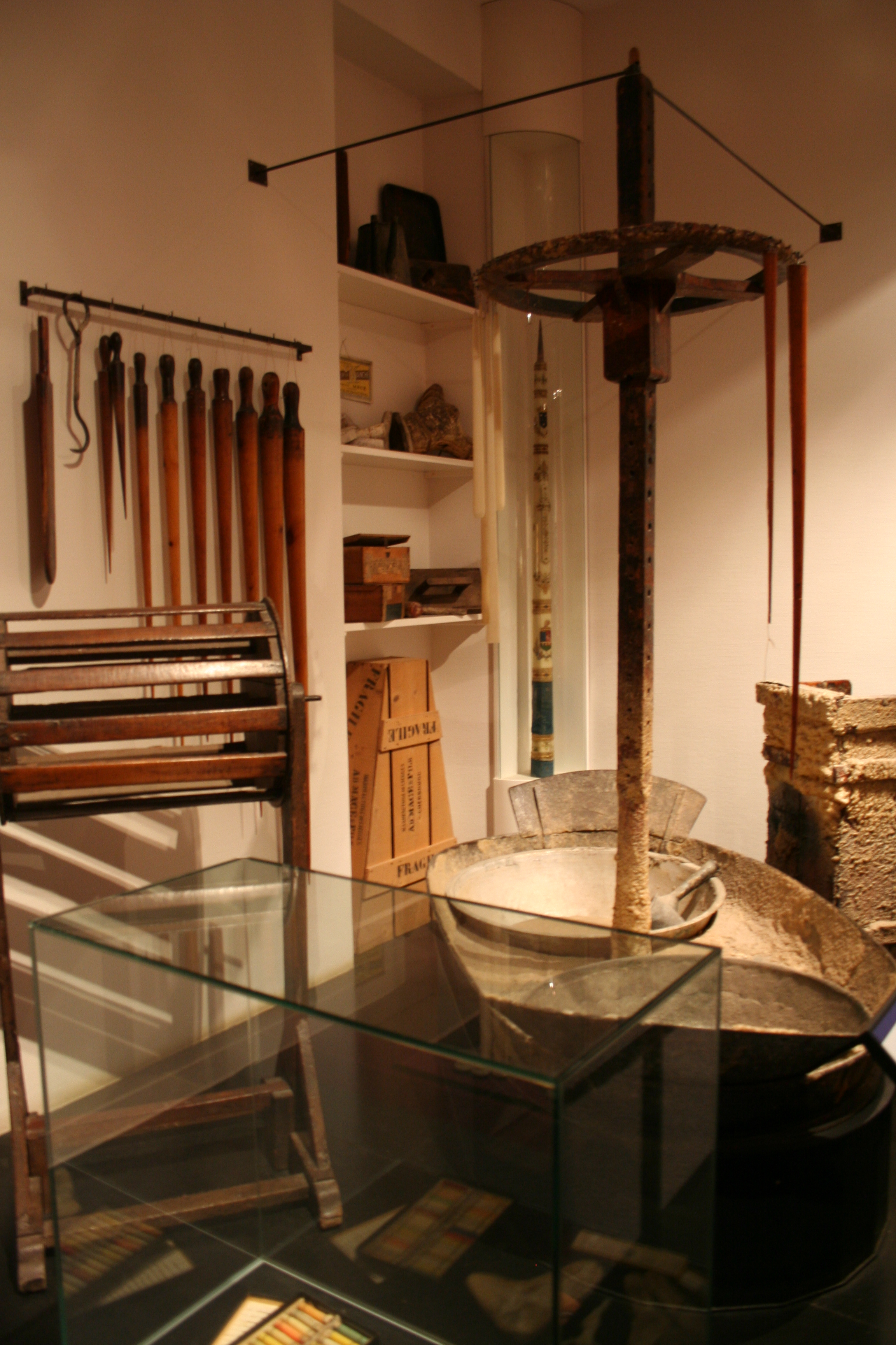 fabrication des cierges